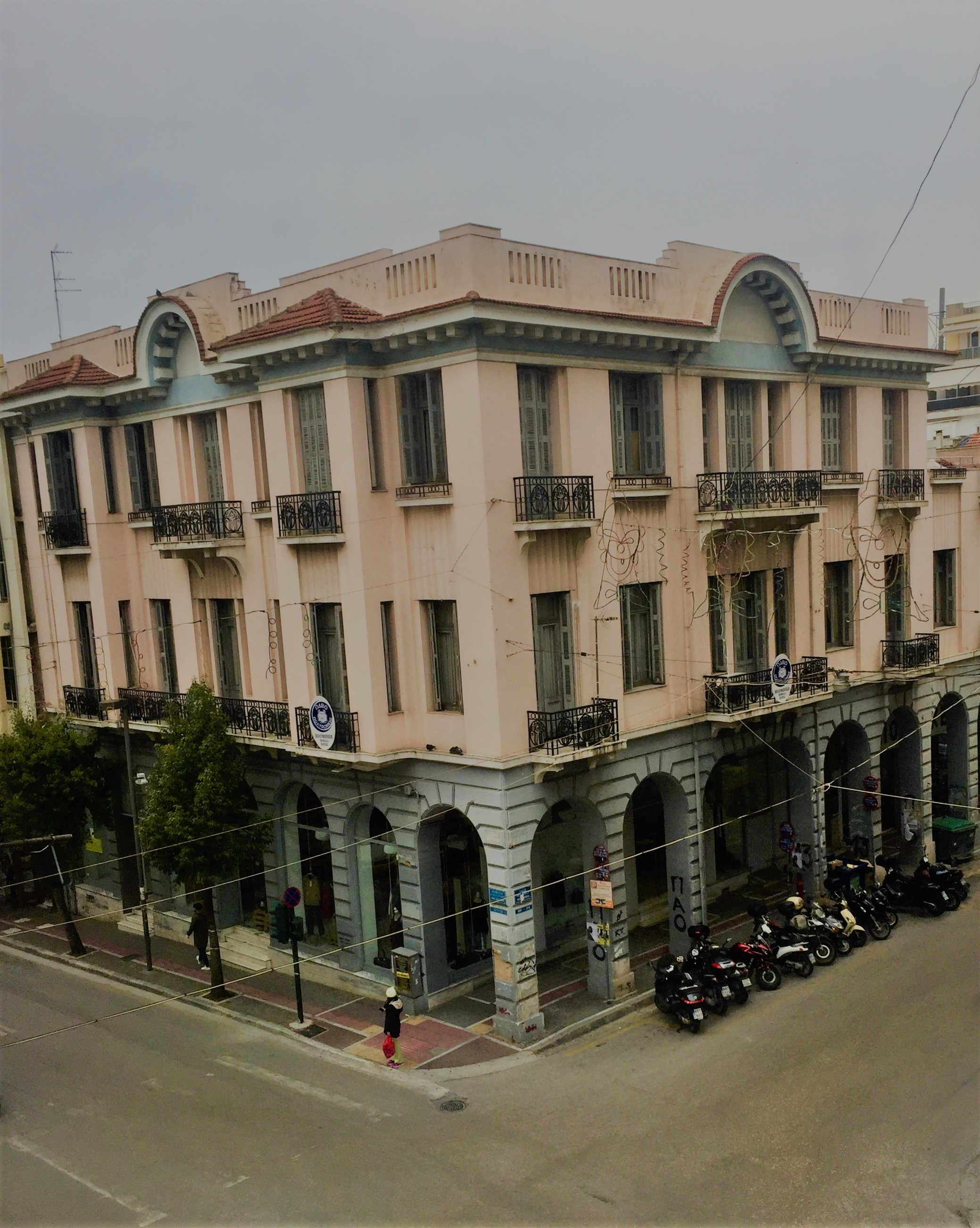 Κορίνθου 280 & Γούναρη, Πάτρα